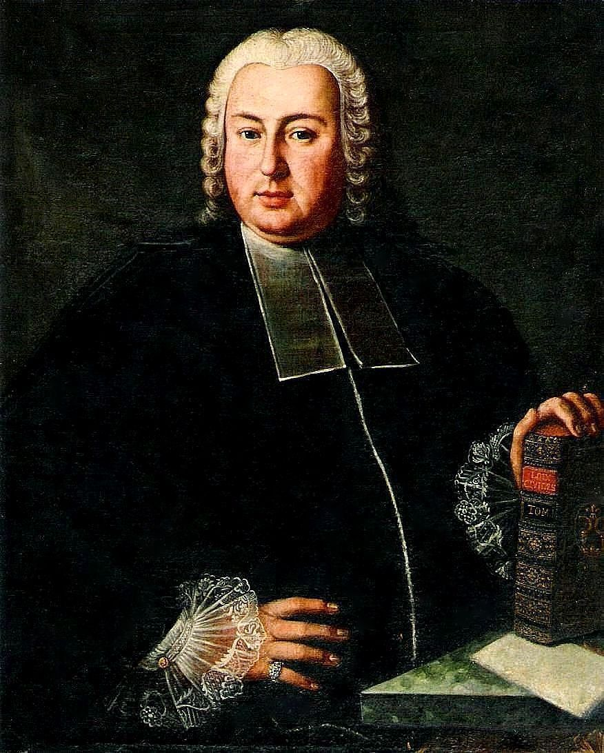 Franz Plazid de Schumacher, 1725-1793, Staatsmann und Naturwissenschaftler, Gemälde im Himmelrich-Herrenhaus Luzern. Das Bild war lange verschollen und als Thomas Morus umgetauft. Die wahre Identität des Dargestellten konnte an Hand des Familienwappens auf dem Buchdeckel festgestellt werden.